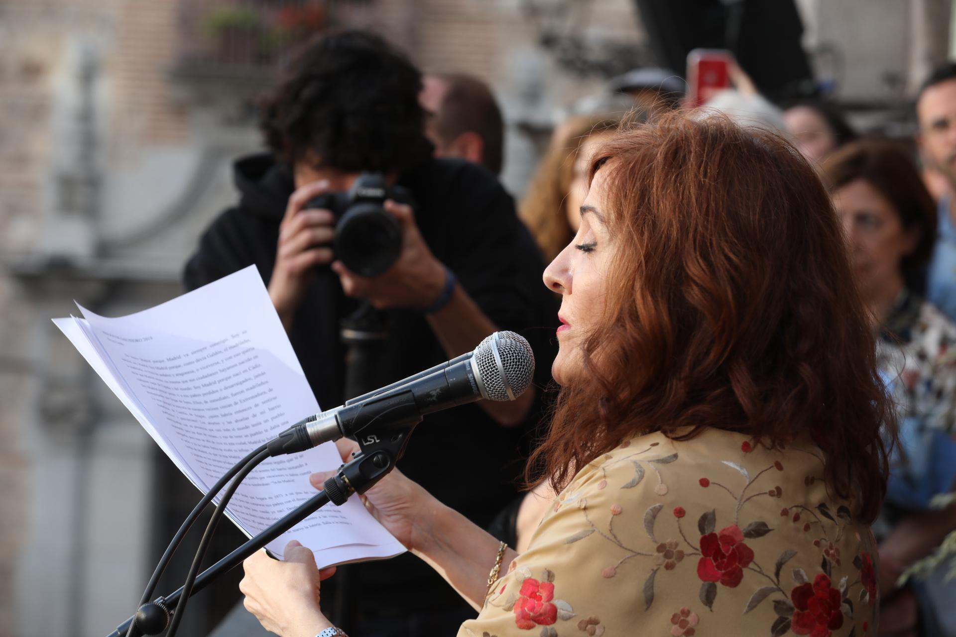 “Soy de Madrid porque nací en Cádiz. Soy de Madrid porque llegué aquí a los 12 años y jamás vi a mis padres perdidos o desarraigados, jamás acomplejados por llegar de fuera; ellos, de inmediato, fueron madrileños”. La escritora Elvira Lindo ha resumido con estas palabras el espíritu acogedor que siempre ha encontrado en esta ciudad, en la que hoy ha sido la pregonera de las fiestas de San Isidro.